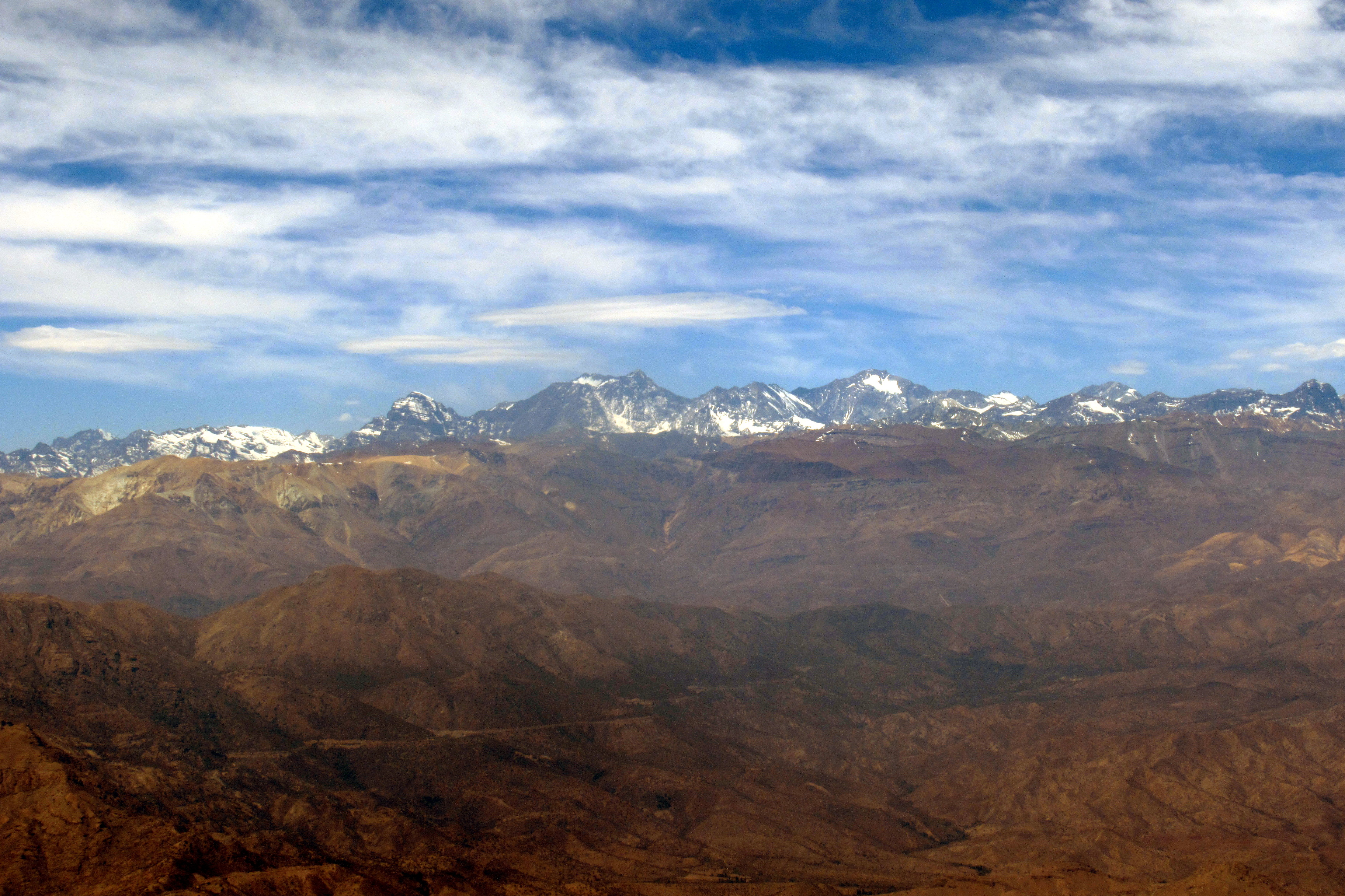 Andespanorama: Alto de Los Leones (5380 m s.n.m.), Nevado Juncal (5965 m s.n.m.), Juncal Chico, Nevado El Plomo (6070 m s.n.m.). Altitud de vuelo 2550 m s.n.m. aproximadamente.